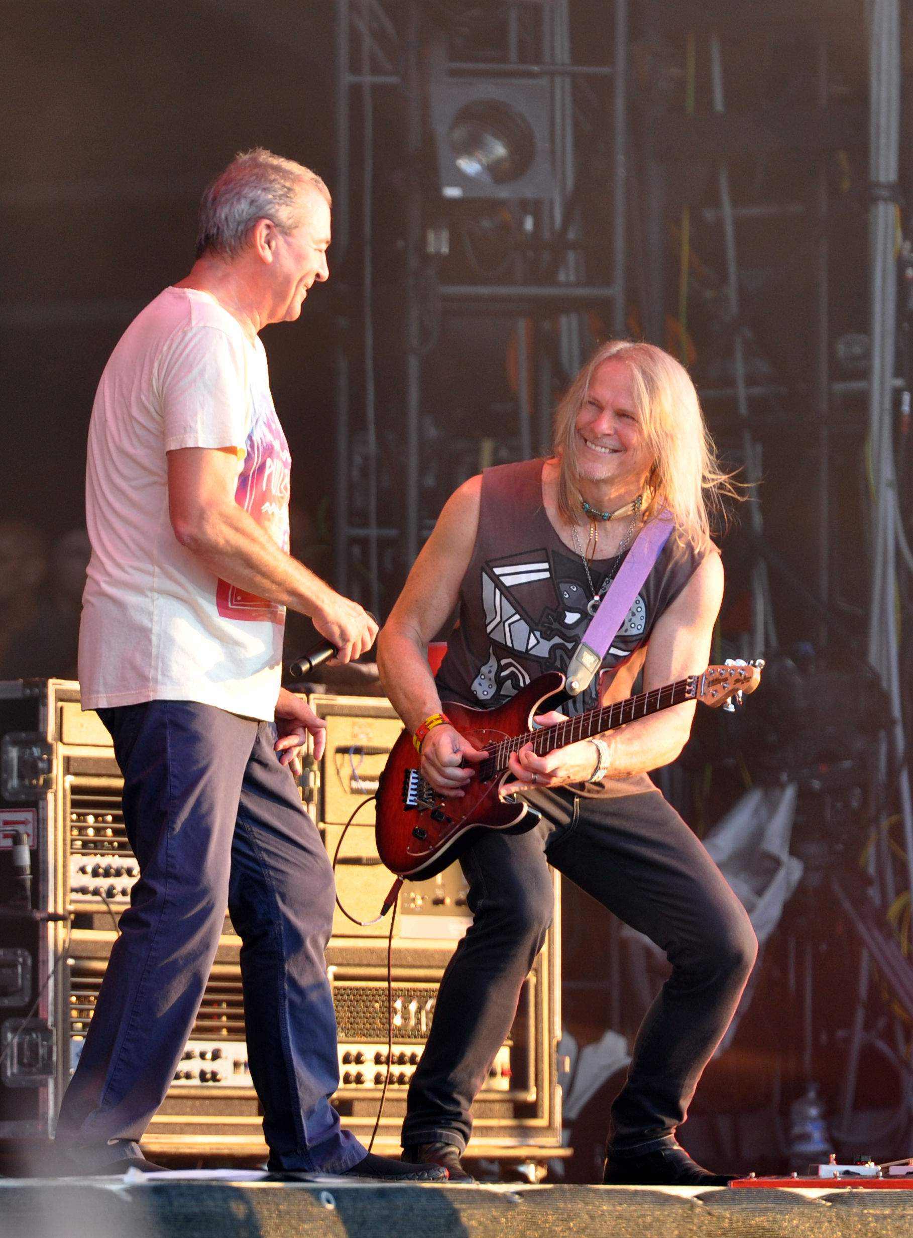 Deep Purple at Wacken Open Air 2013